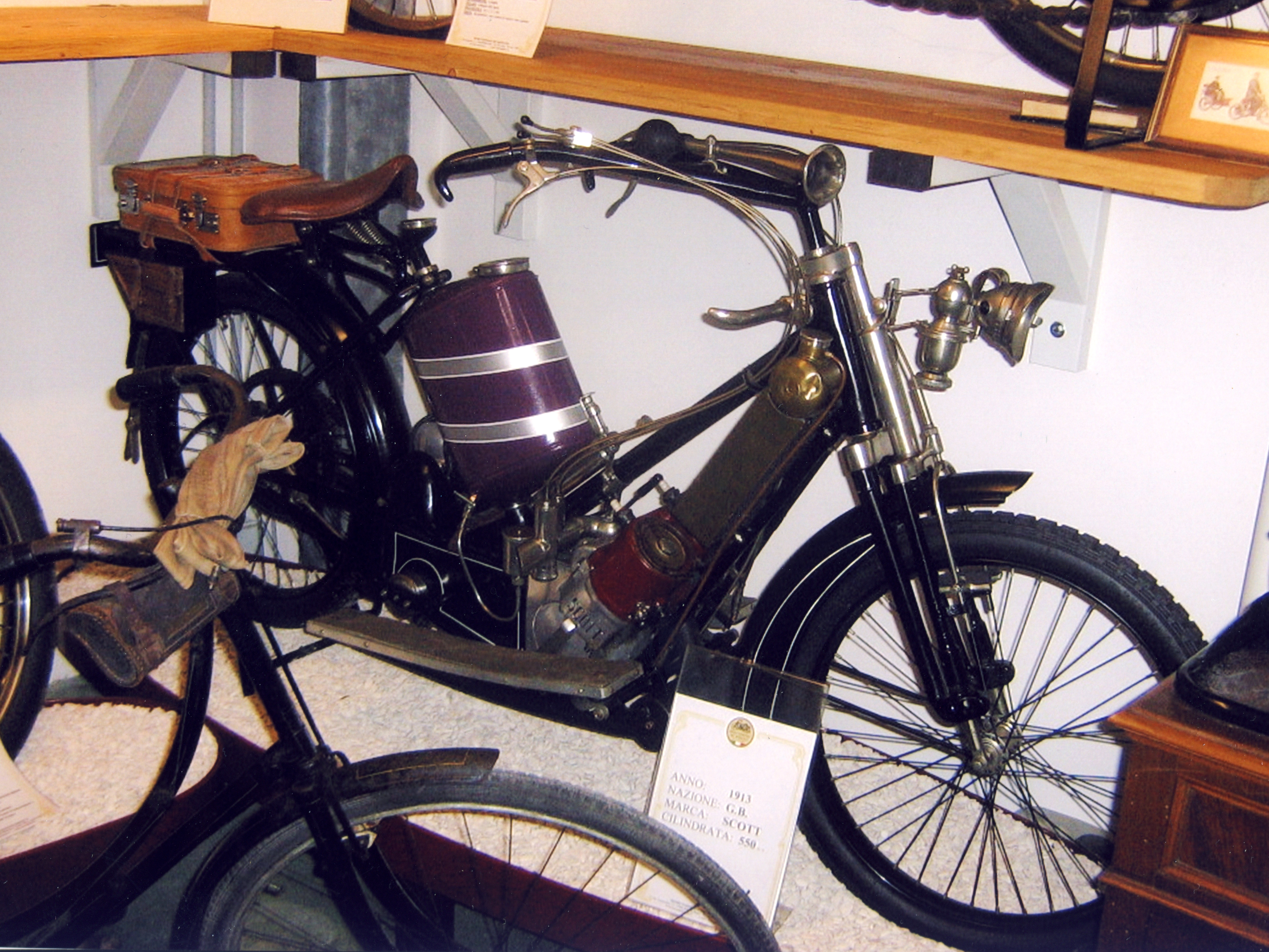 La Scott 550 del 1913 esposta al Museo del Motociclo di Rimini